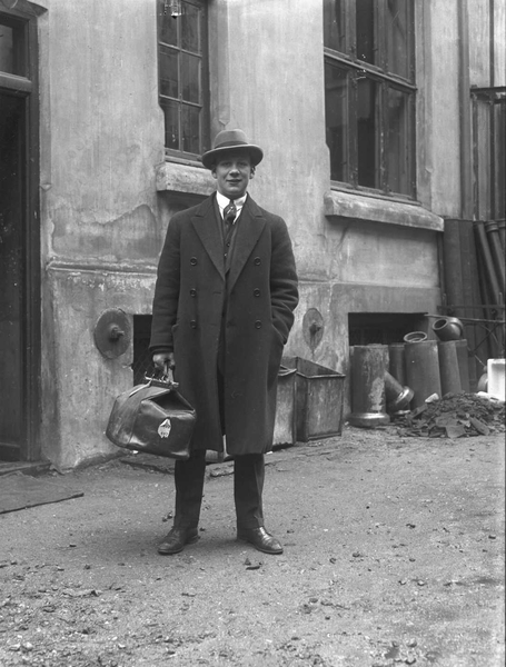 mann, bokser, hatt, frakk, jordmorkoffert, bygård, søppelkasser.